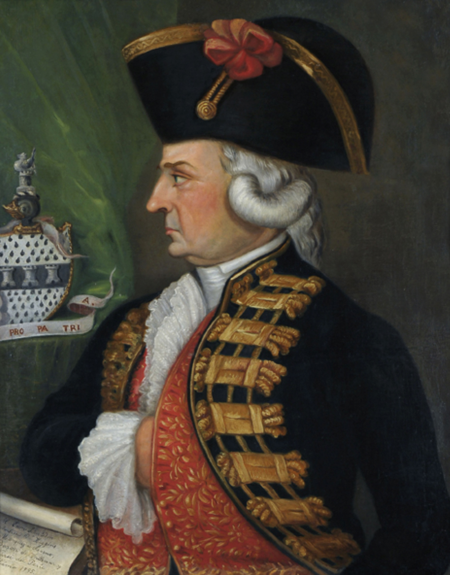 Portrait of Ambrosio O'Higgins (1720-1801), gobernador de Chile (1788-1796) y virrey del Perú (1796-1800)